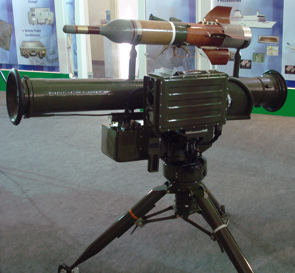 IDEF '07 Savunma Fuarı'nda çekildi.Baktar Shikan.23 Mayıs 2007